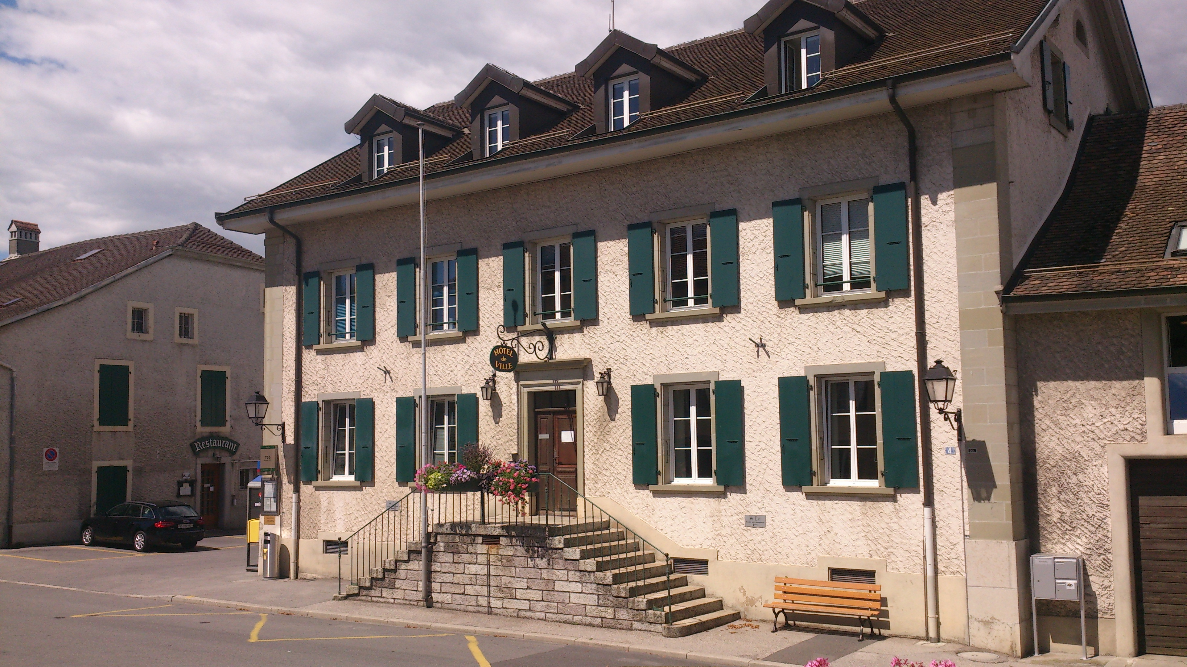 route